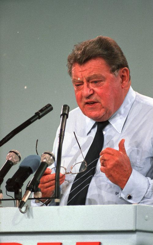 7./8.10.1986 34. Bundesparteitag der CDU in der Rheingoldhalle, Mainz (6.-8.10.1986)